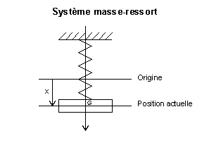 Schéma décrivant un système masse-ressort. Image personnelle.